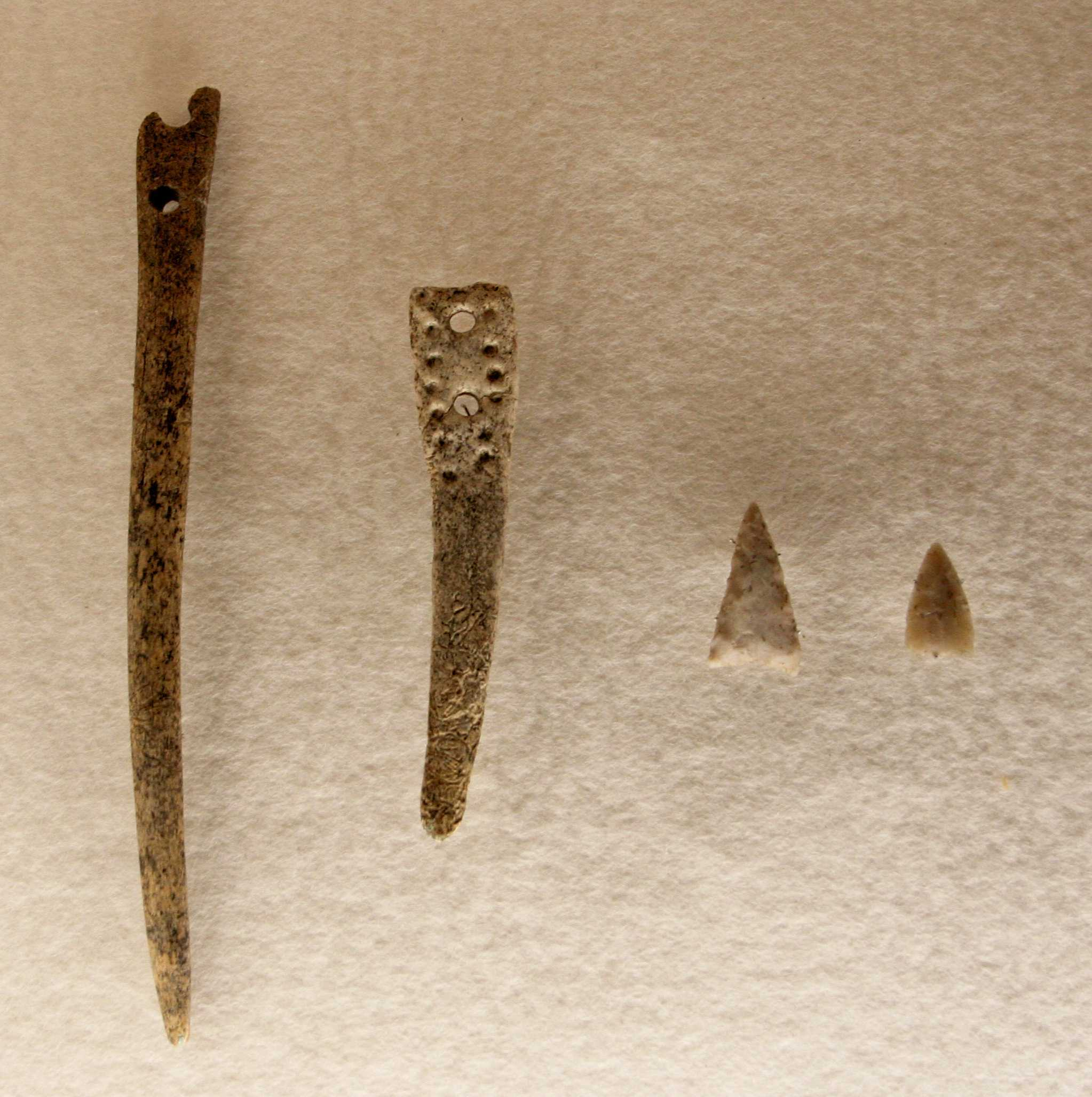 Auswahl Nadeln und Pfeilspitzen aus der Totenhütte von Benzingerode